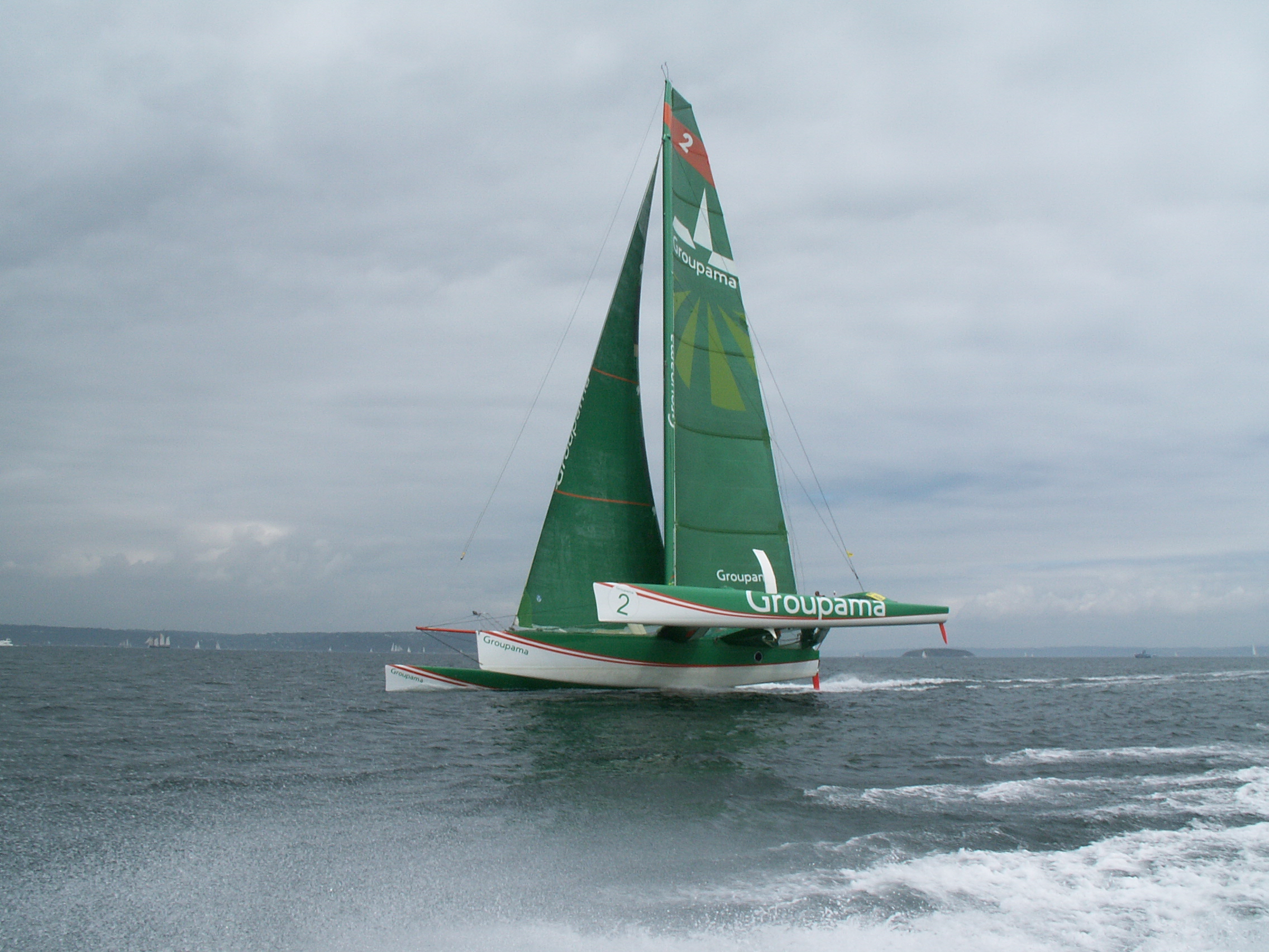 le trimaran de régate Groupama 2 au "fête de mer" Brest 2008